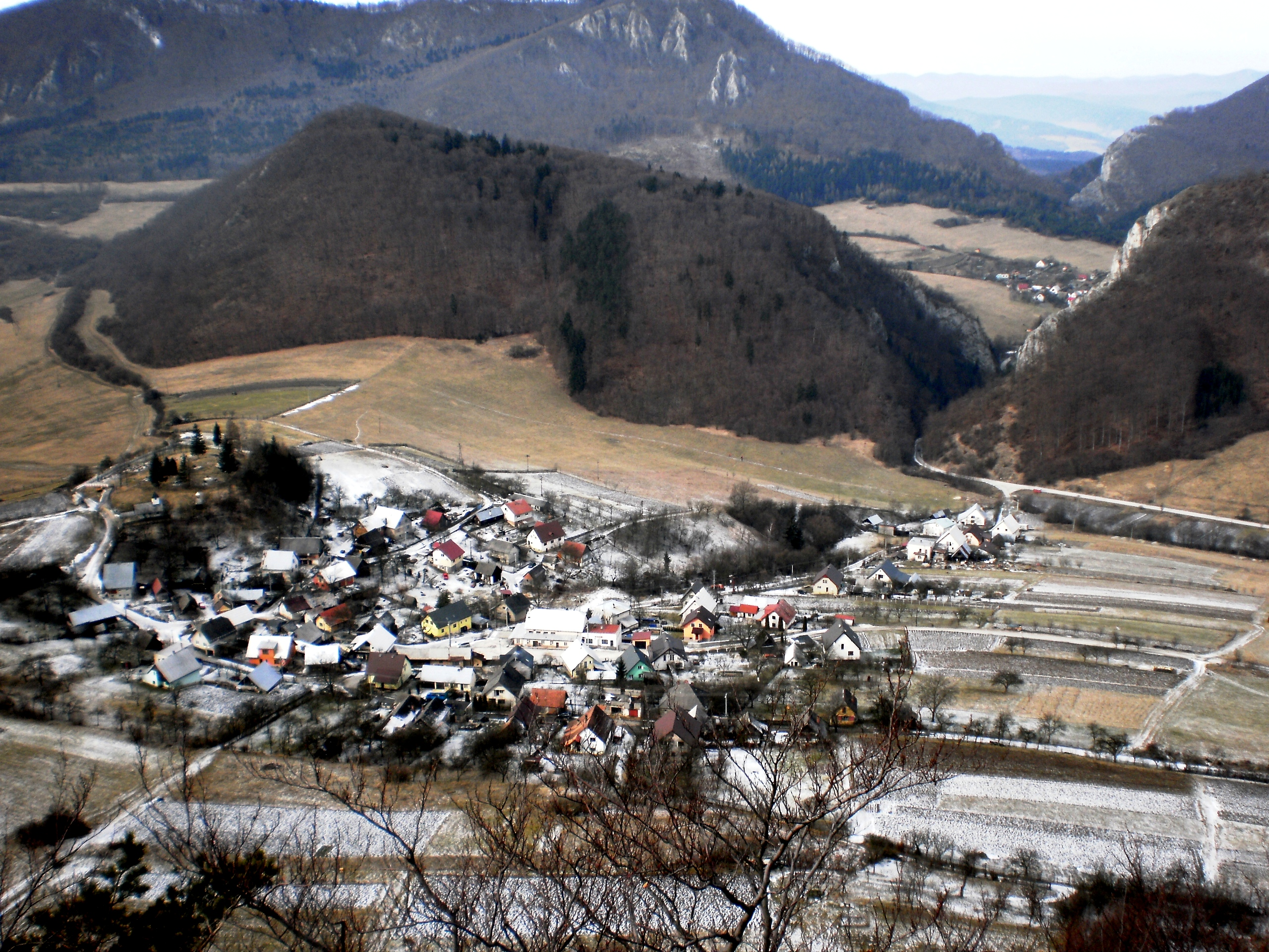 Dedinka Kostolec